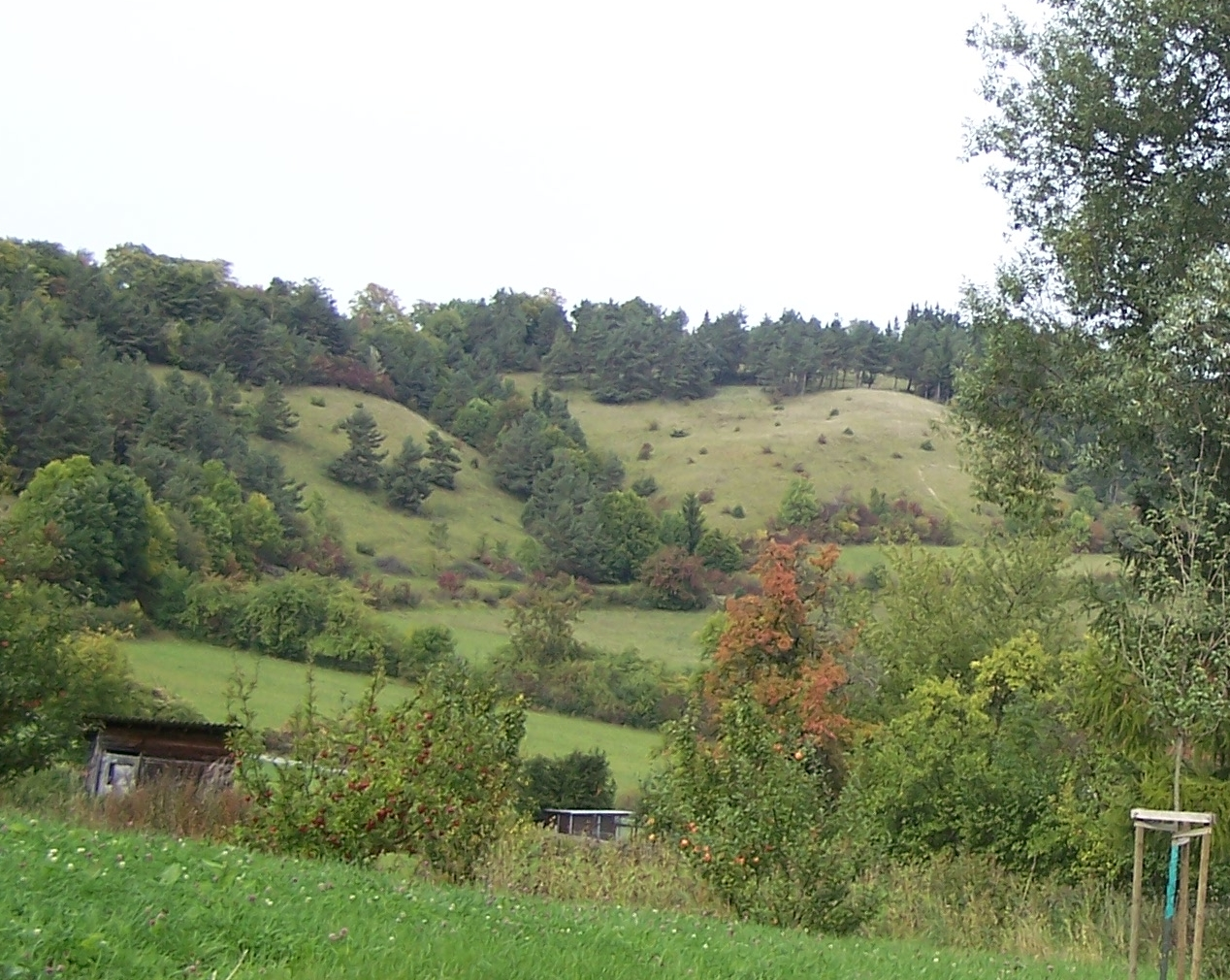 Blick vom westlichen Ortsrand Dermbach OT Oberalba nach Norden zum NSG Muschelkalkhänge.